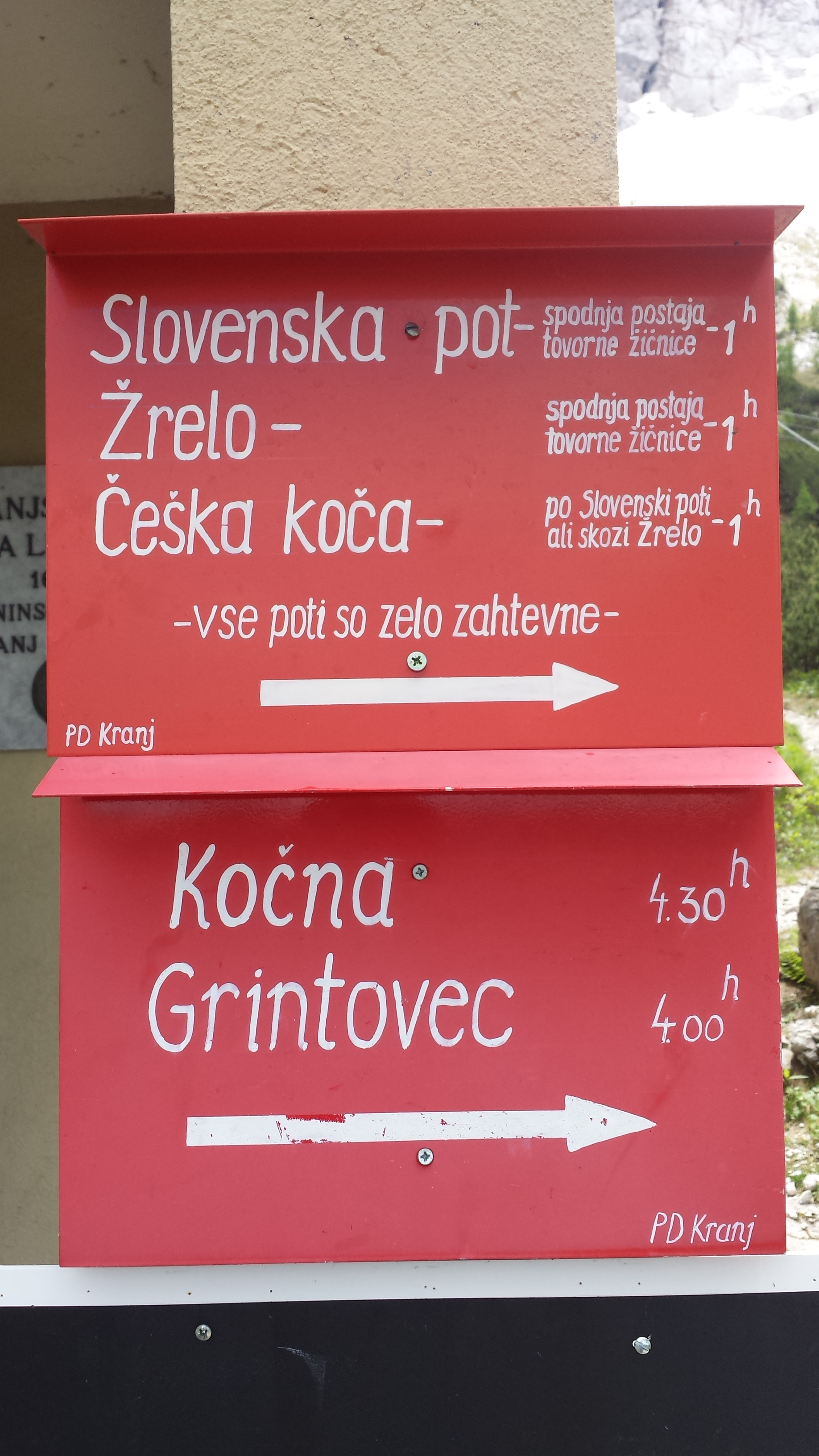 Kranjska koča na Ledinah 1869 m. n. m. Jezersko, Slovenija Smerokazi pri koči